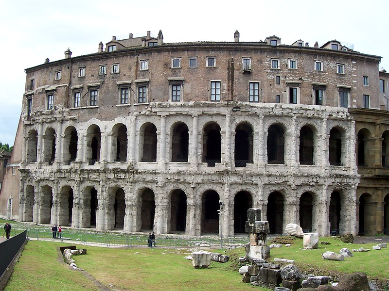 Roma - Teatro di Marcello